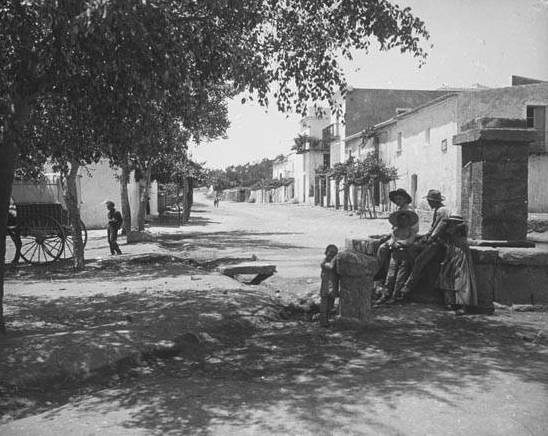 Imatge